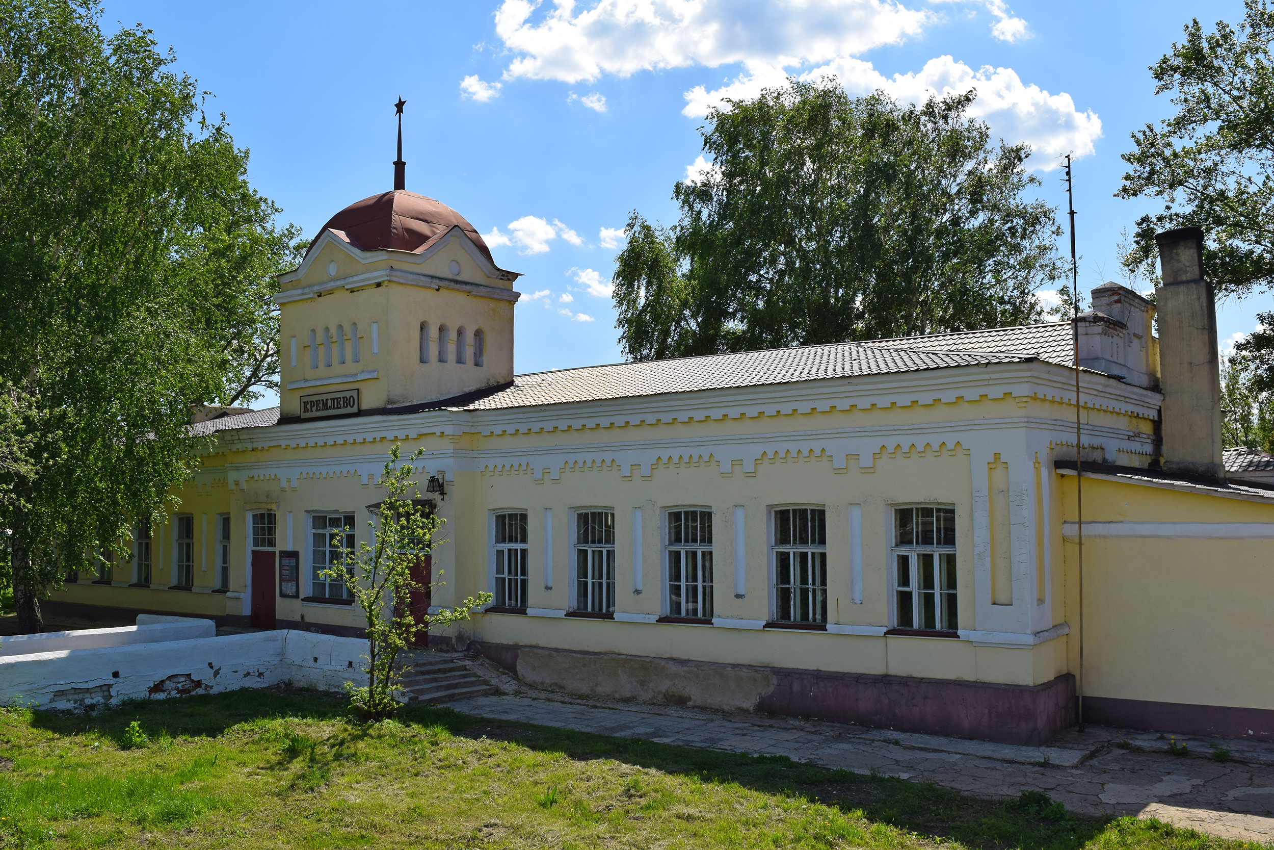 Здание железнодорожного вокзала станции "Кремлево", Скопинский район, Рязанская область